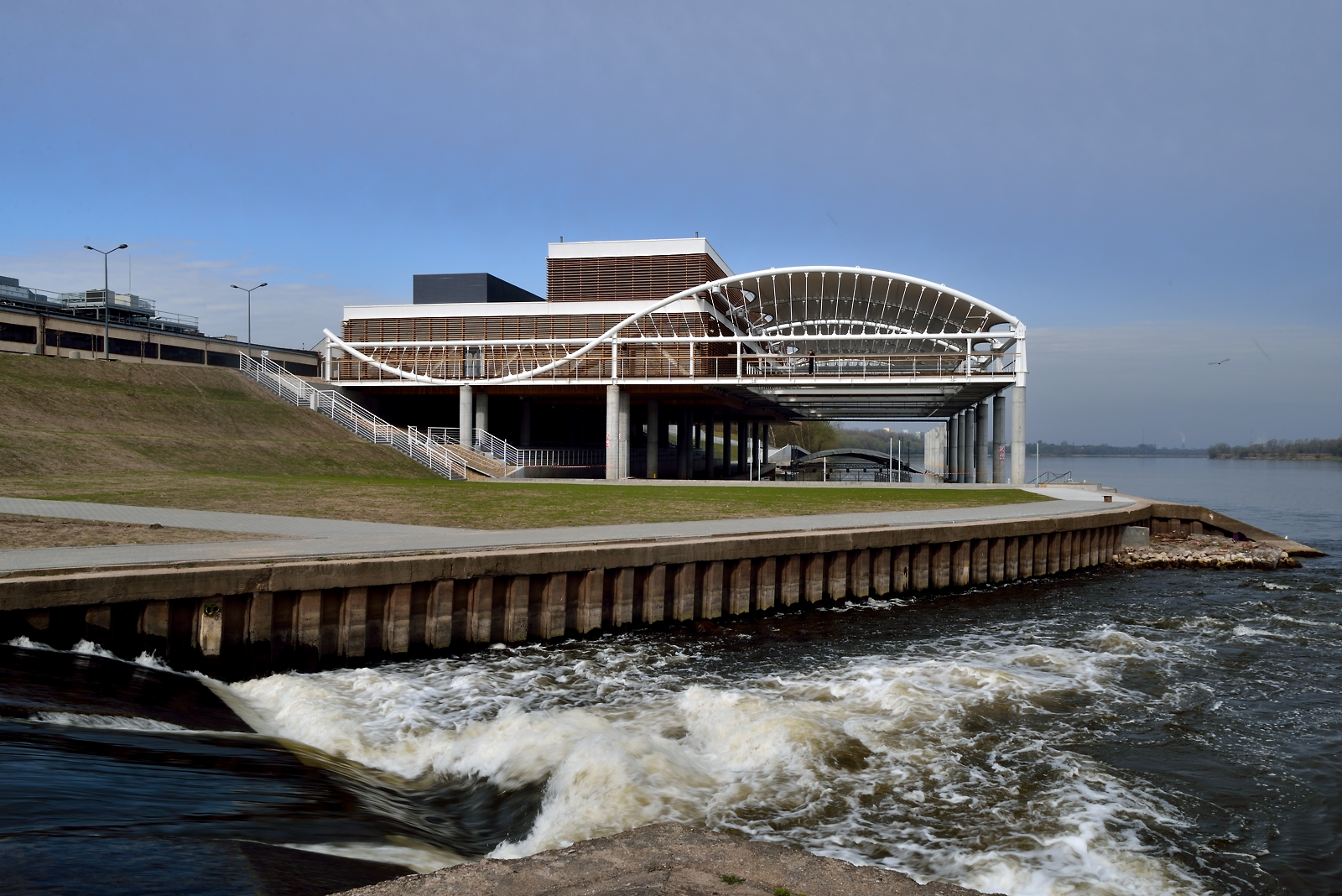 Przystań miejska u ujścia Zgłowiączki do Wisły (w końcowej fazie budowy)